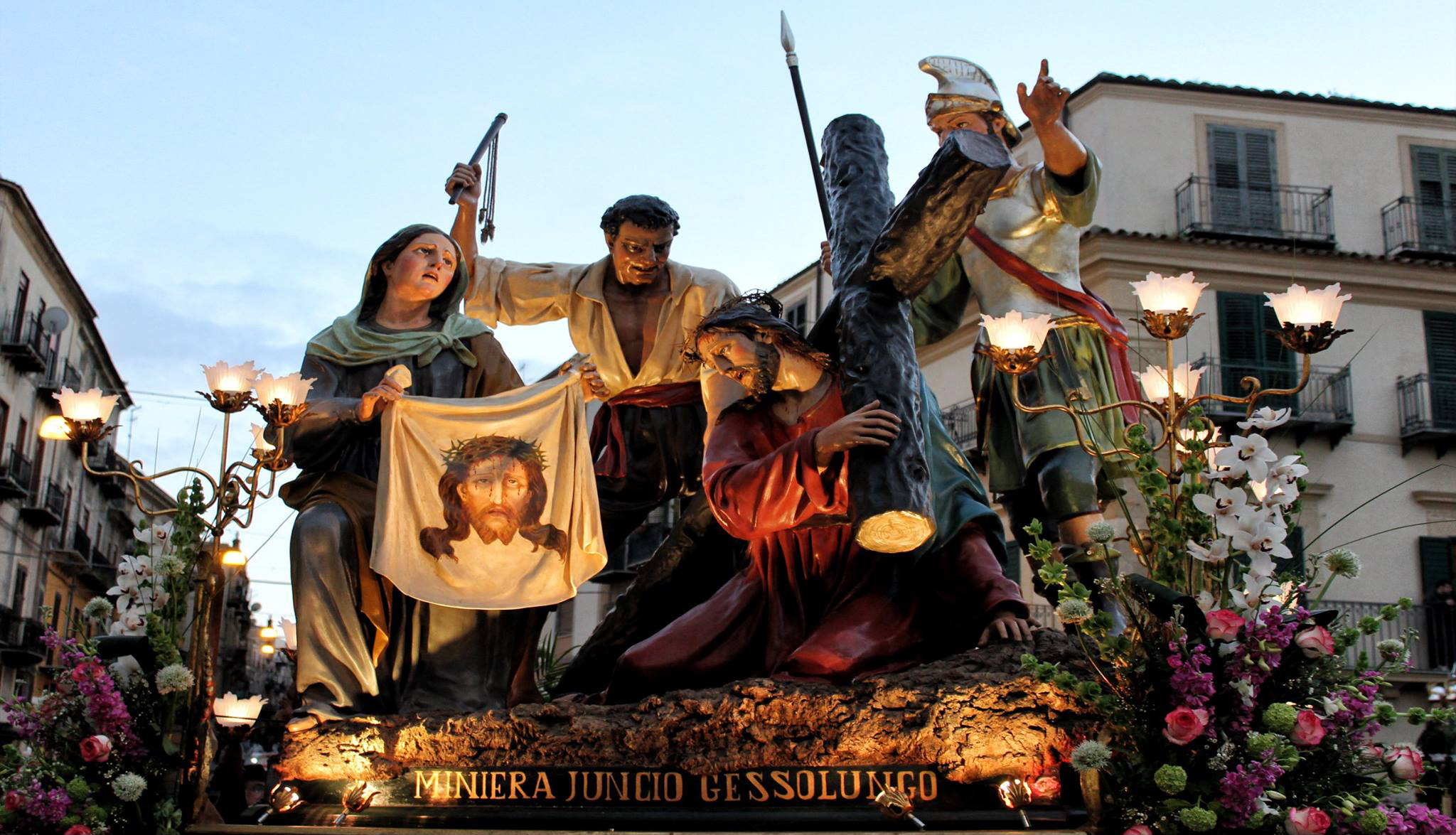 Caltanissetta,Fu Realizzata nel 1883 Da Francesco e Vincenzo Biangardi gli fu commissionata dai minatori di Gessolungo Foto Di Giuseppe Sanalitro